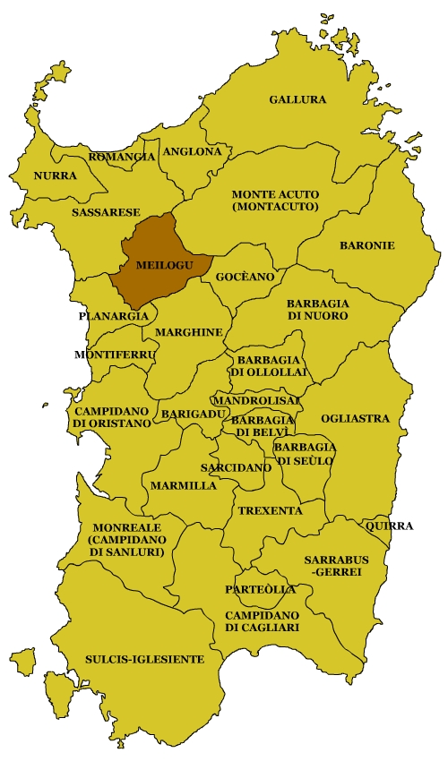 Sardinian Subregions